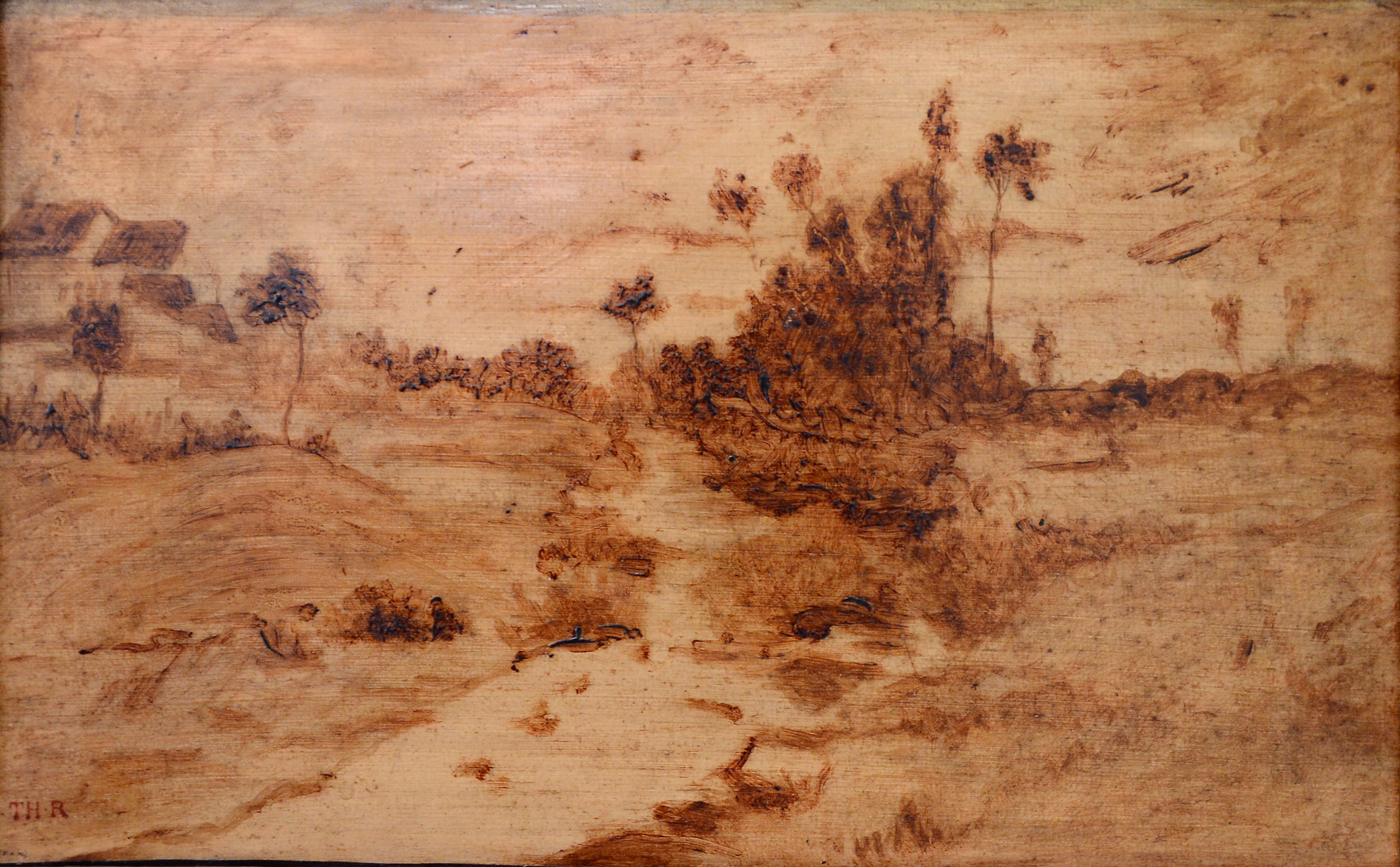 Esquisse de paysage. Vers 1830. Huile sur toile Legs de M. er Mme Raymond Koechlin 1931 (Inv. Nr. 1317)